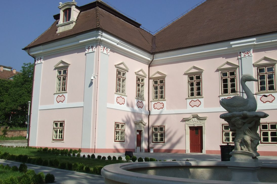 Magna Curia Castle, Deva, Romania